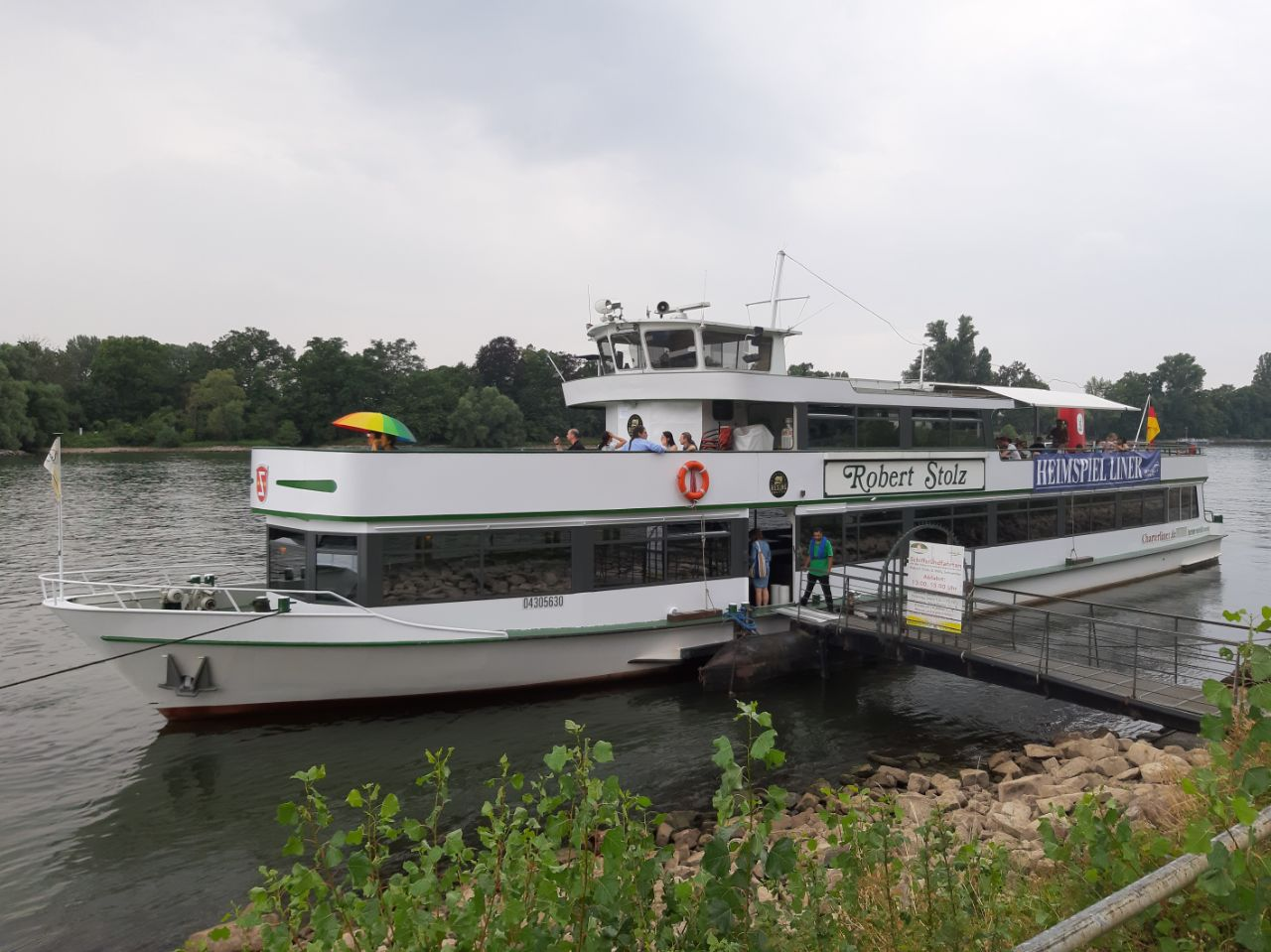 Der Heimspiel-Liner auf dem Rhein, Anleger Eltville-Erbach